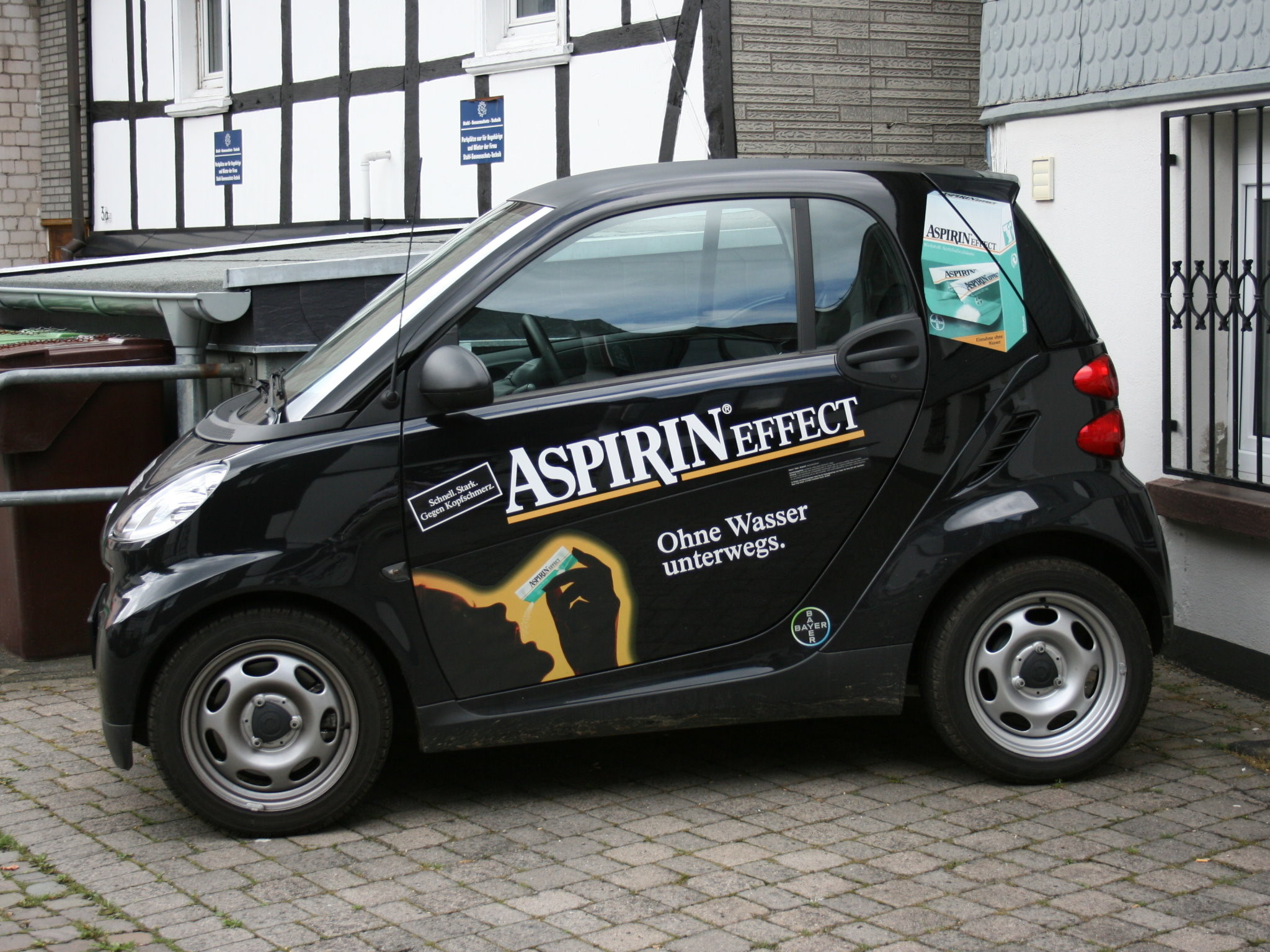 Aspirin-Smart